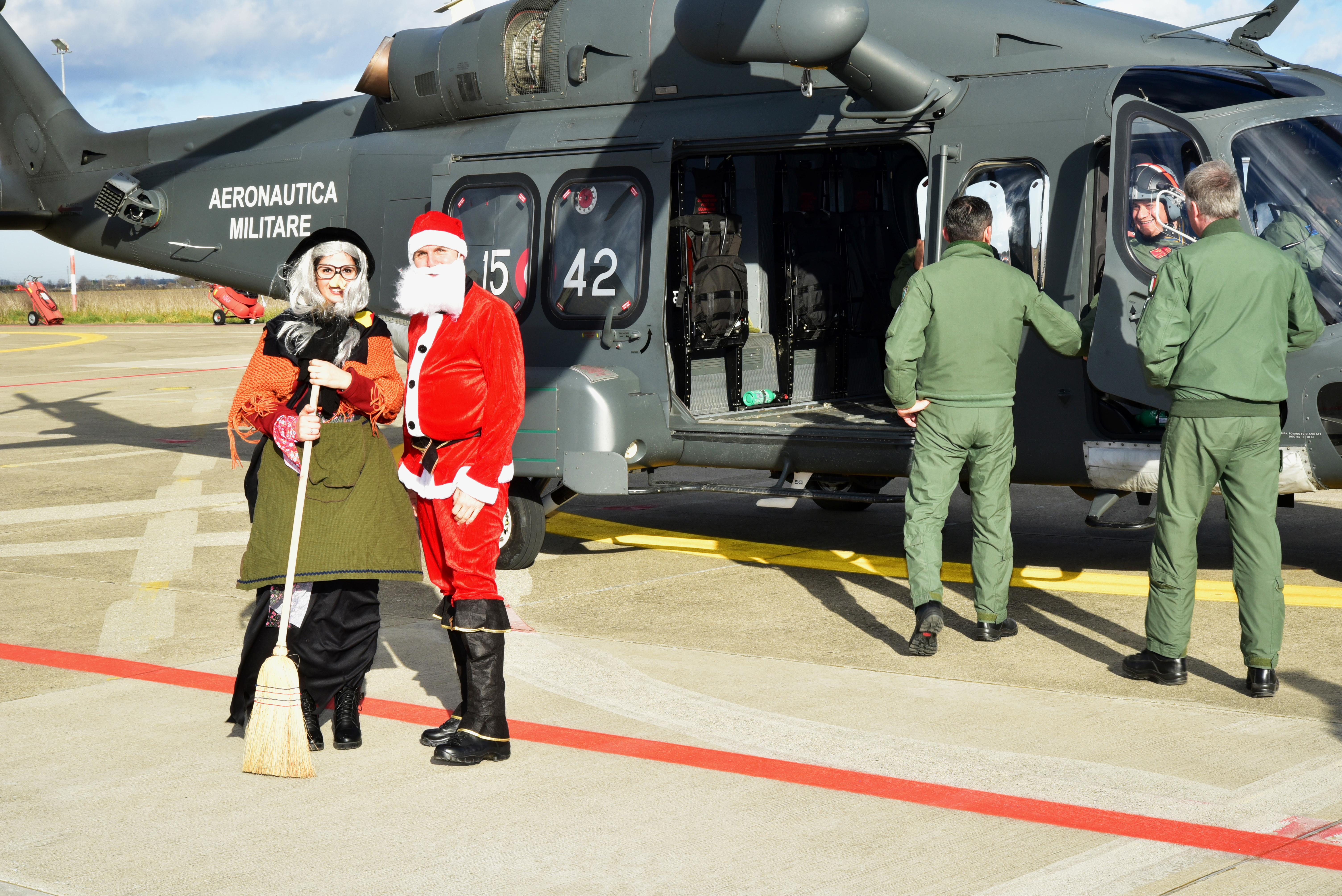 Foto scattata in occasione della Befana del 15º Stormo, 2017.